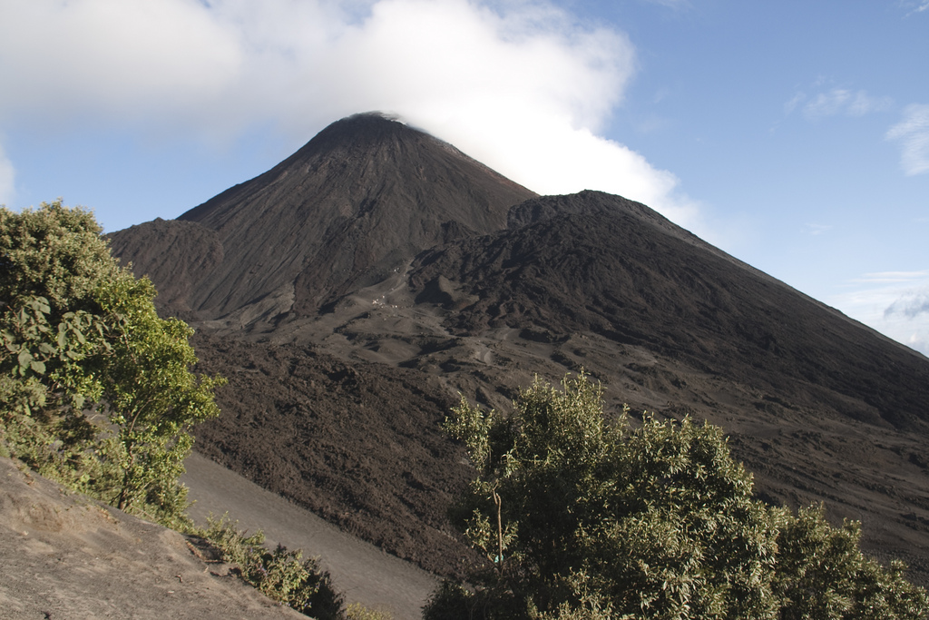 Volcán Pacaya, Guatemala.